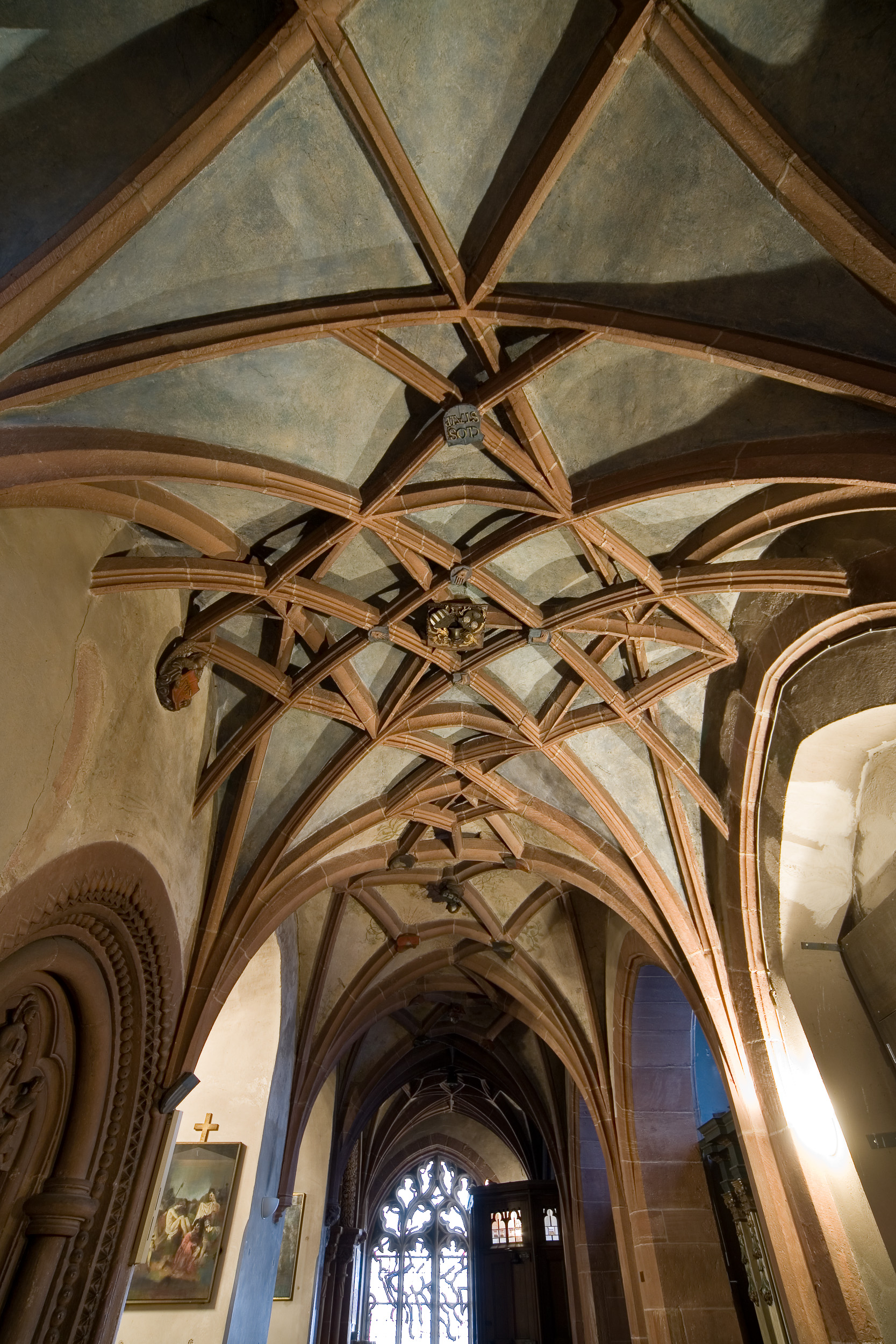 Sterngewölbe, hier hauptsächlich der 1507 von Claus Stalburg gestiftete Teil, im nordöstlichen Seitenschiff der Leonhardskirche in Frankfurt am Main. Selber fotografiert im März 2008, Doppellizensierung GFDL & CC-BY-SA 2.5. Detailbilder des Gewölbes finden sich hier